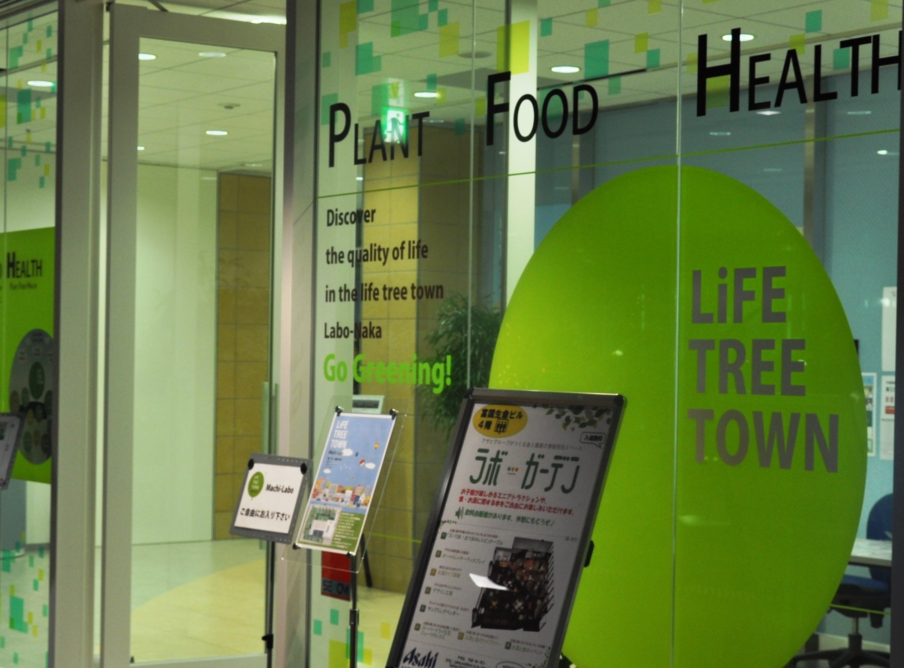 go greening